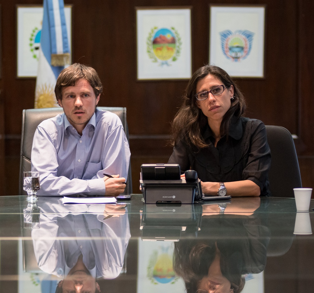 Augusto Costa y Paula Español